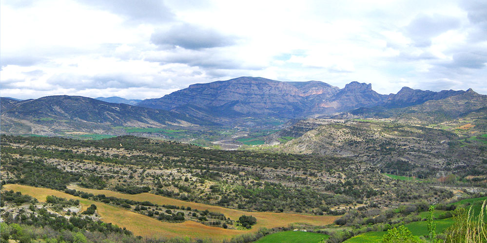 Vista de la Ribagorça des de Roda d'Isàbena.